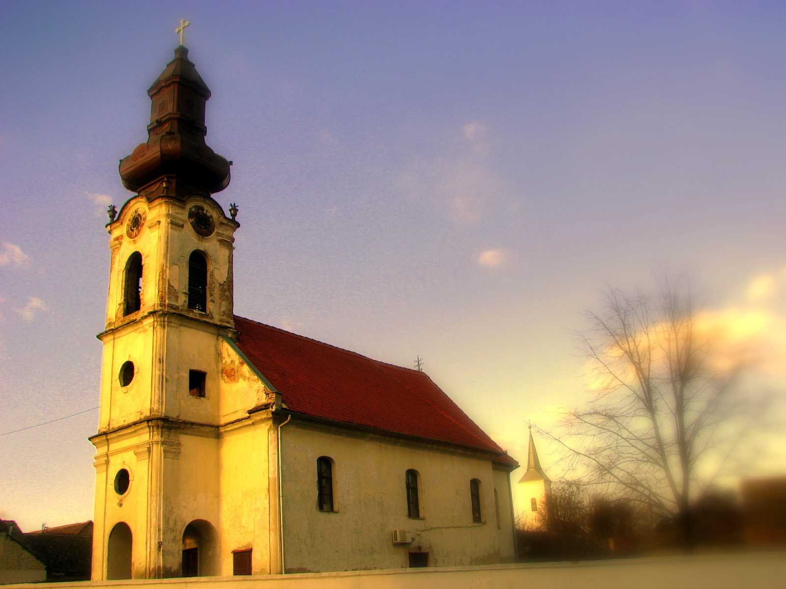 Православна црква у Кнежевим Виноградима, Аутор: Бранко Тодоровић